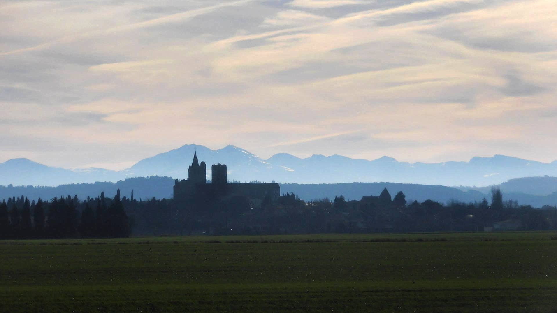 Le village et son église au lerver du jour. On distingue la tour du château d'eau. En arrière, le pic du Saint-Barthélémy.